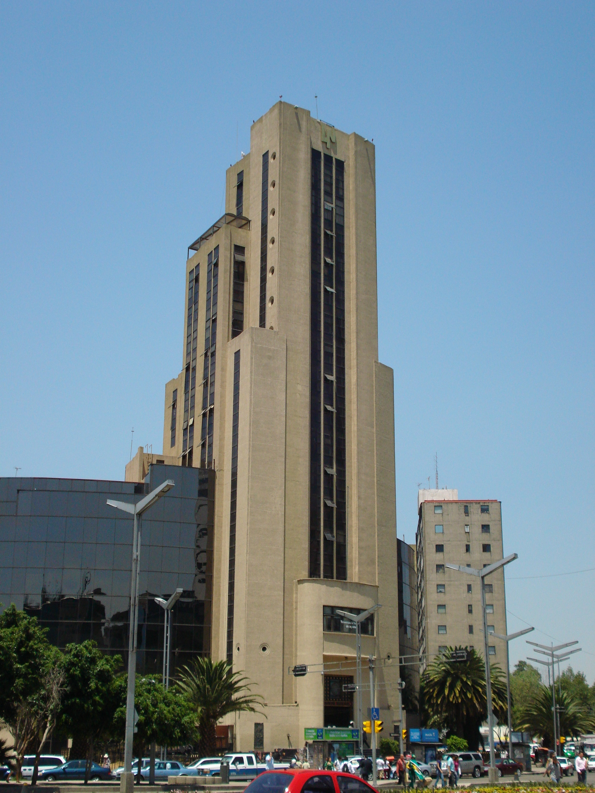 Edificio El Moro, sede de la Lotería Nacional de México, desde la avenida Paseo de la Reforma.